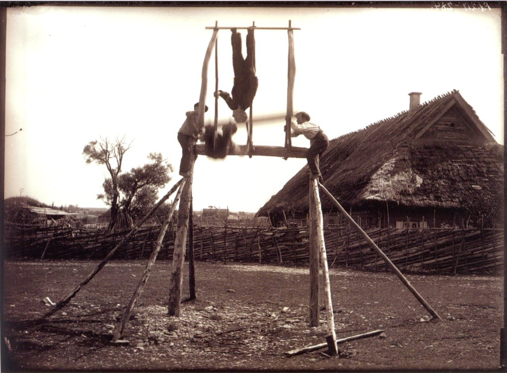 Poisid kiike üle võlli ajamas Ohessaare külas Saaremaal